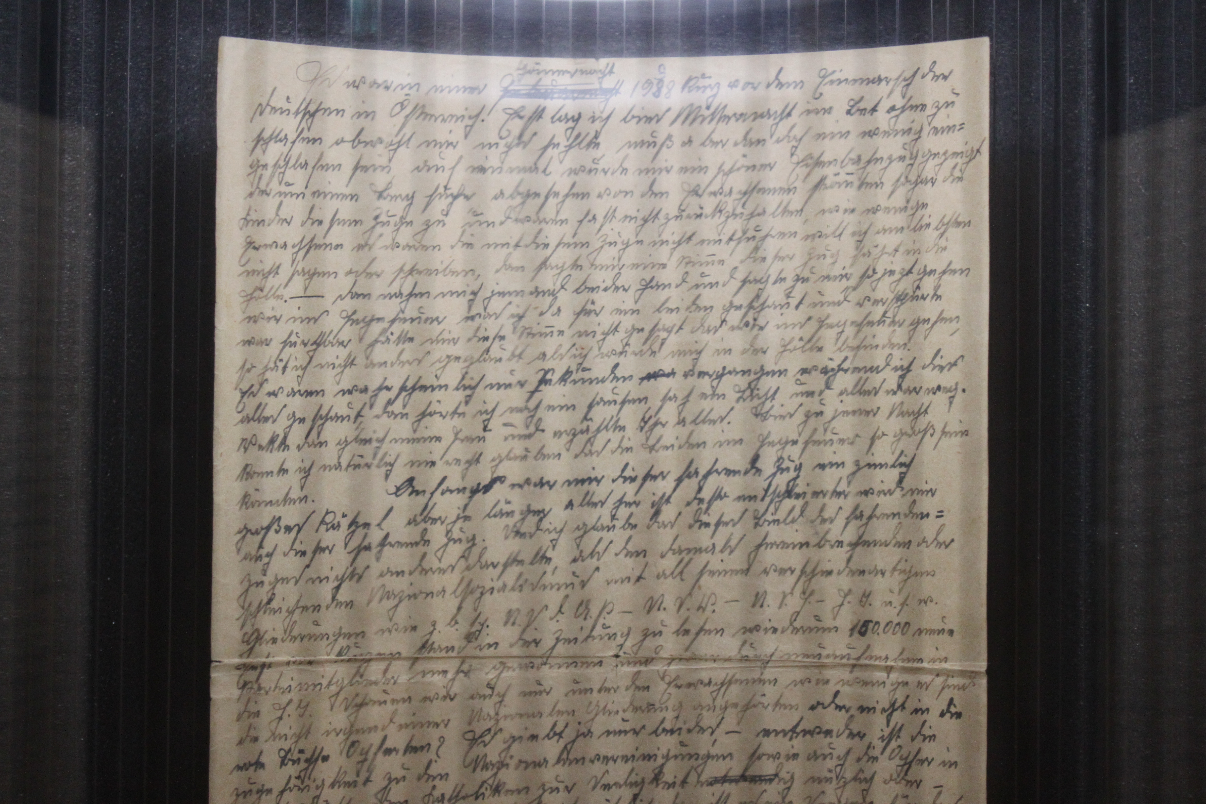 Gedenkort zu Franz Jägerstätter im Neuen Dom in Linz, Brief von Jägerstätte in der Stele, Detail